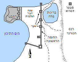 מפת אזור עתלית העתיקה.קובץ שיצרתי בעזרת תוכנת "צייר" של חלונות, והעלתי בפברואר 2006.אסף.צ 11:08, 27 פברואר 2006 (UTC)